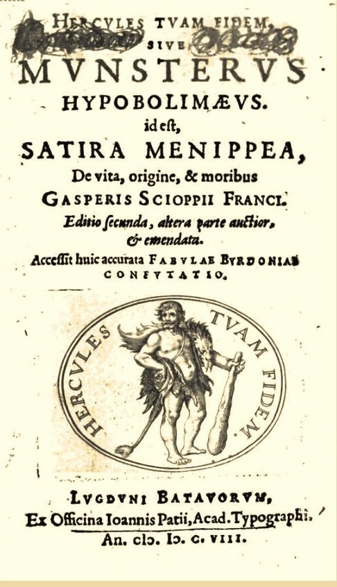 Portada de l'obra "Hercvles Tvam Fidem, Sive Mvnstervs Hypobolimaevs. id est, Satira Menippea, De vita, origine, & moribus Gasperis Scioppii Franci" de Joseph Juste Scaliger. Editio secunda. Lugduni Batavorum: Ex officina Ioannis Patii, 1608.